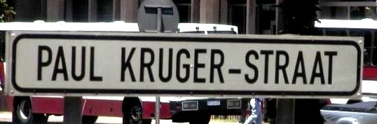 Panneau de rue à Pretoria - 1998